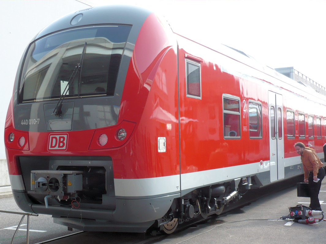 DBAG Baureihe 440 (Alstom Coradia Continental)